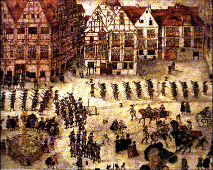 Parade des Ulmer Kreiskontingentes am 31.03.1677 auf dem Münsterplatz. Ausschnitt aus einem Bild im Ulmer Museum. 2 = Unteroffiziere mit Kurzgewehr, 3= Mannschaften mit Muskete und Säbel